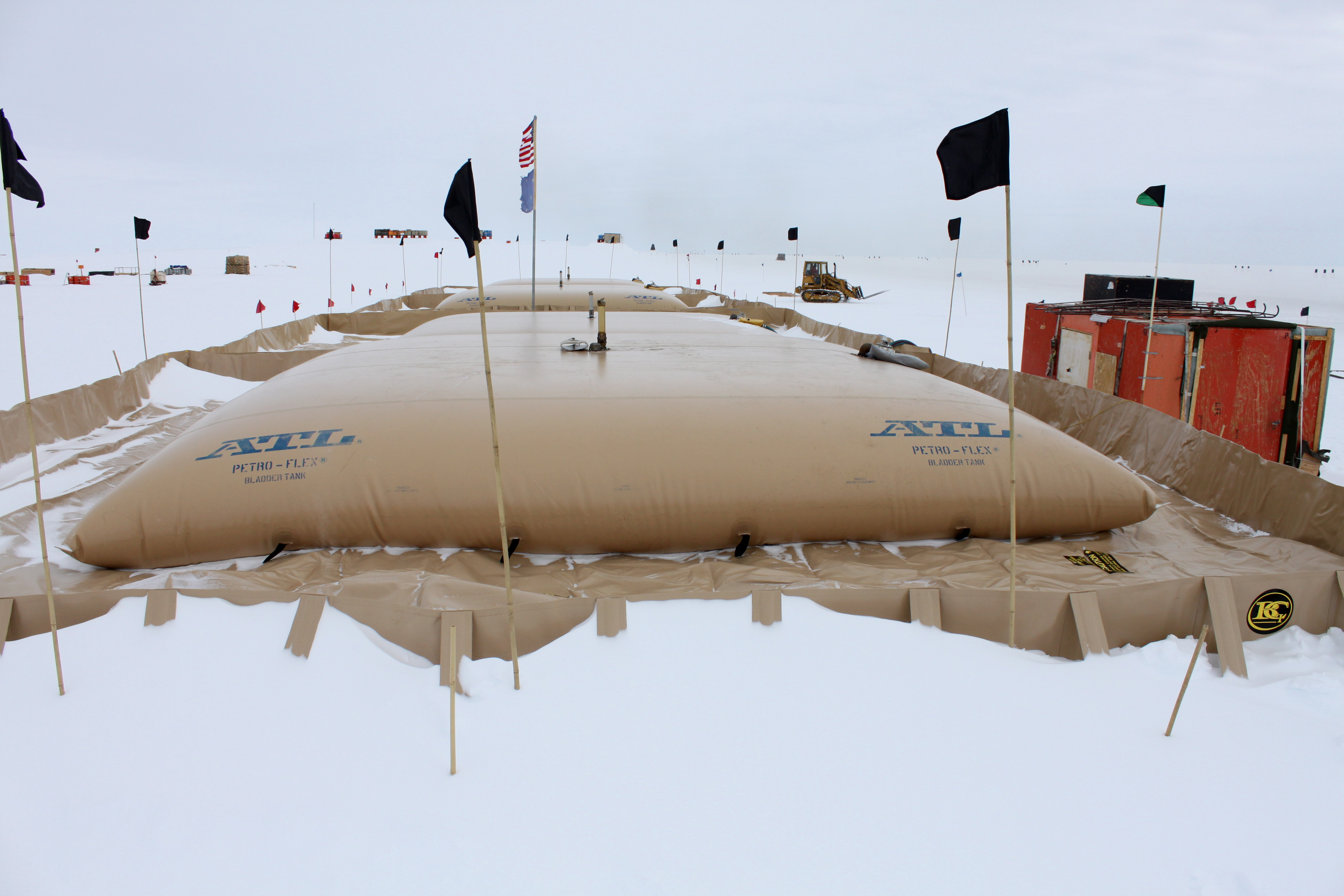 Fuel Bladders